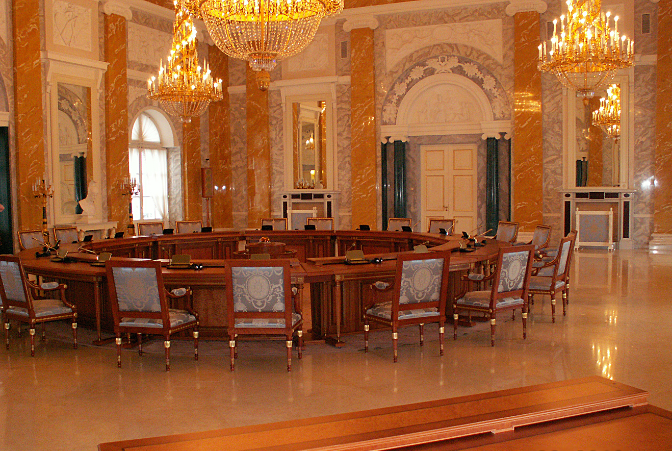 Константиновской дворец в Стрельне. Зал переговоров. 2010 г.